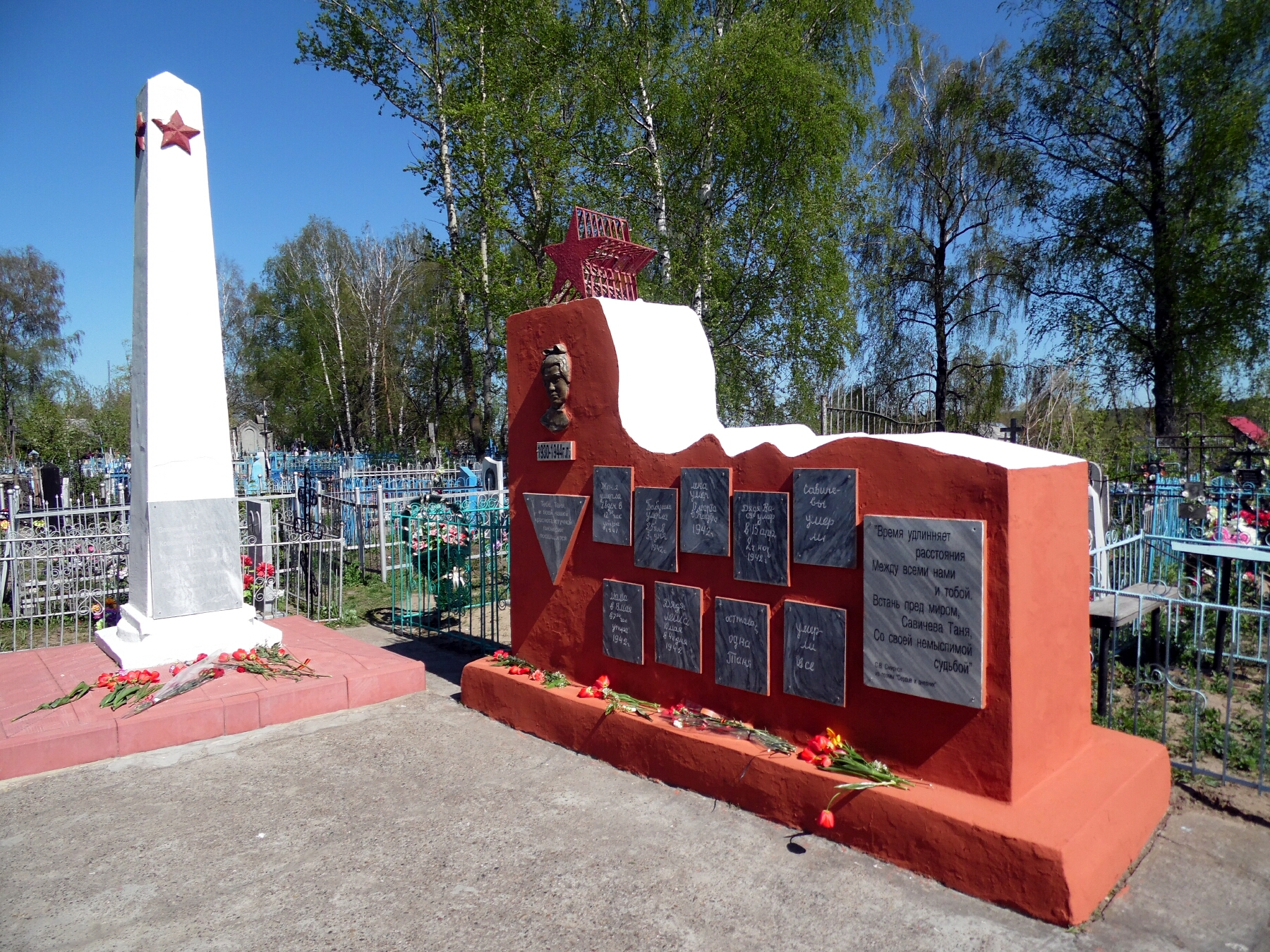 Память о Тане Савичевой увековечена не только в городе на Неве, но и в небольшом рабочем посёлке Шатки Нижегородской области, где девочка умерла в эвакуации